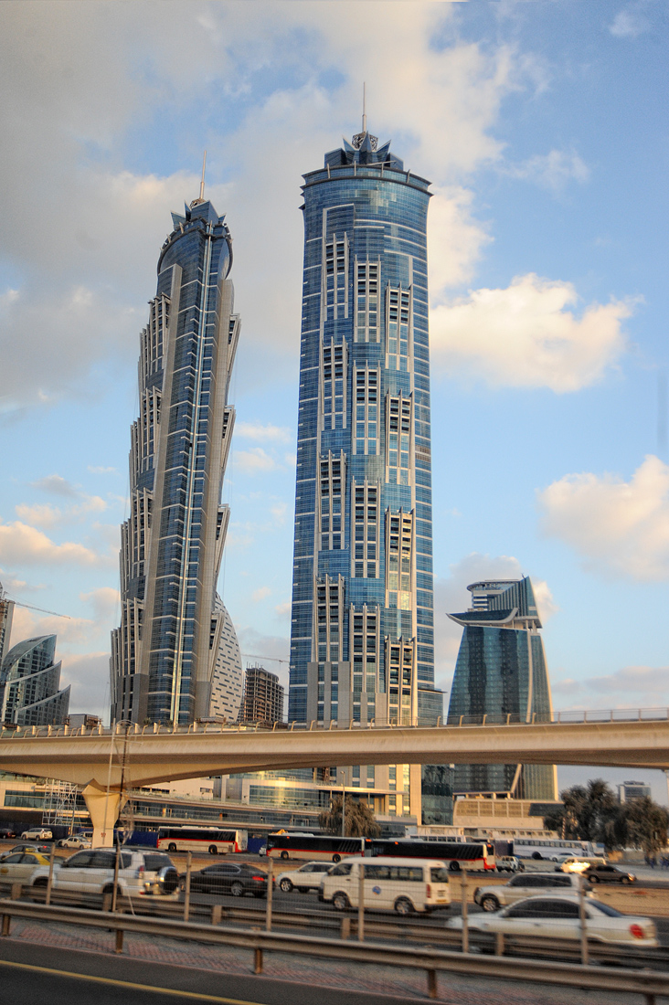 Зимний Дубаи